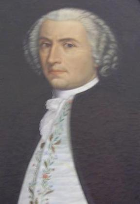 Retrato de Francisco Salzillo, obra de Juan Albacete (1823-1883).